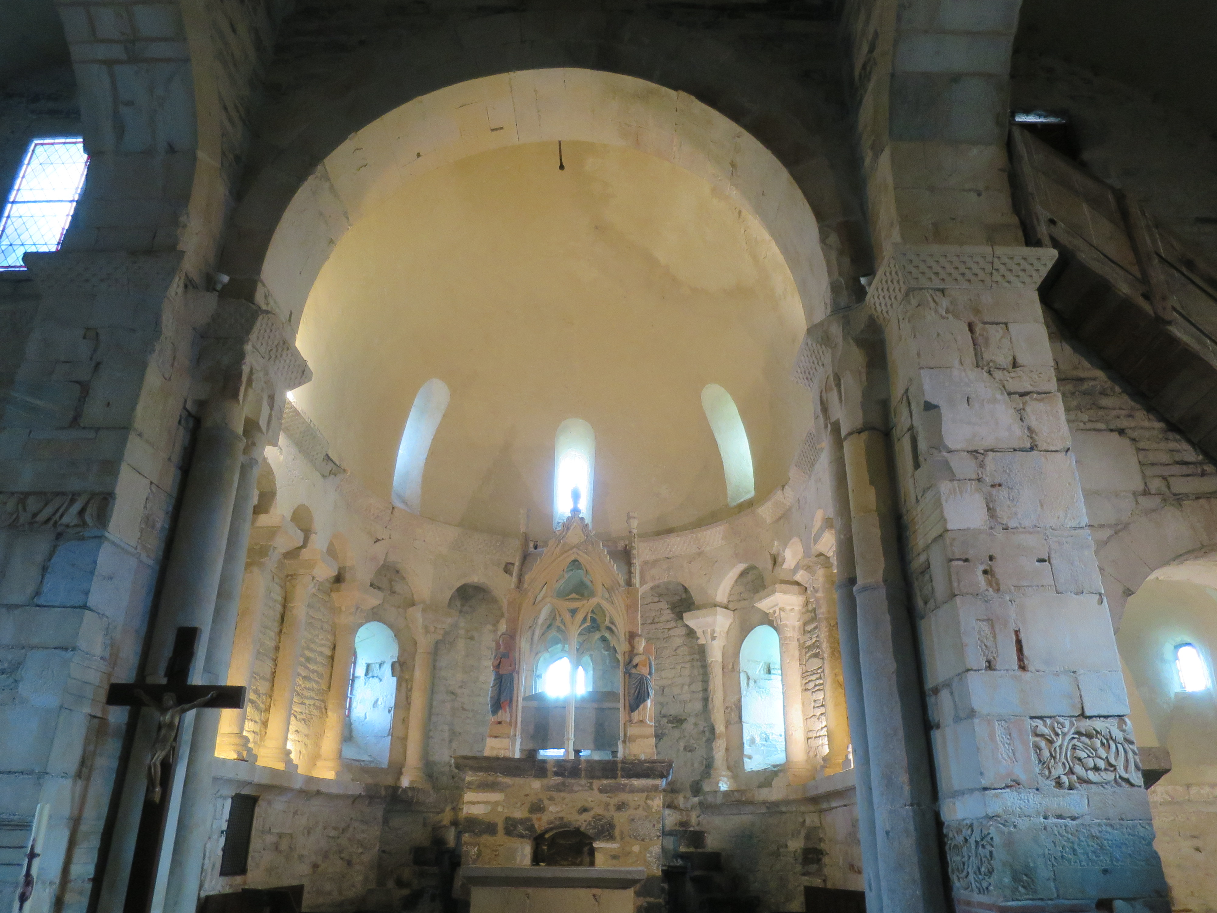 Chor der Kirche Saint-Just de Valcabrère